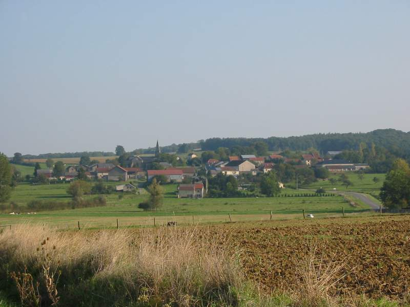 Chatillon-sur-Bar, Ardennes, France Photographie J. Guibourt J. Guibourt